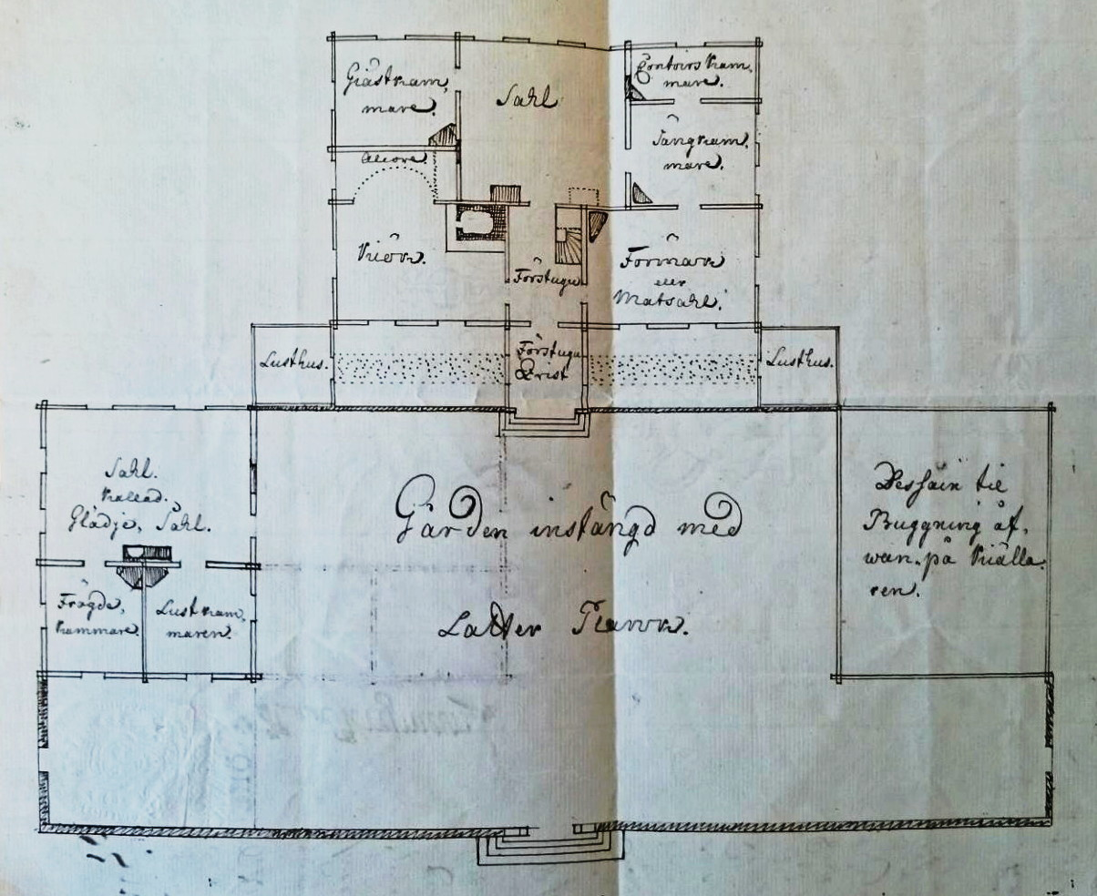 Ritning över huvudbyggnad och flyglar på Sågarbo, sannolikt från 1755, då gården synades i samband med att Charles De Geer köpte den av Claes Anckarström. Stora Enso ABs arkiv